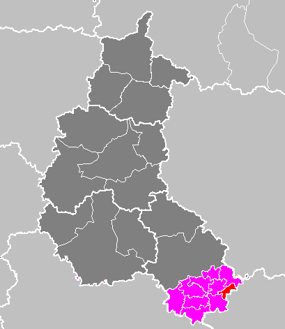 Maps of arrondissements and cantons of France: Arrondissement de Langres - Canton de Laferté-sur-Amance.PNG